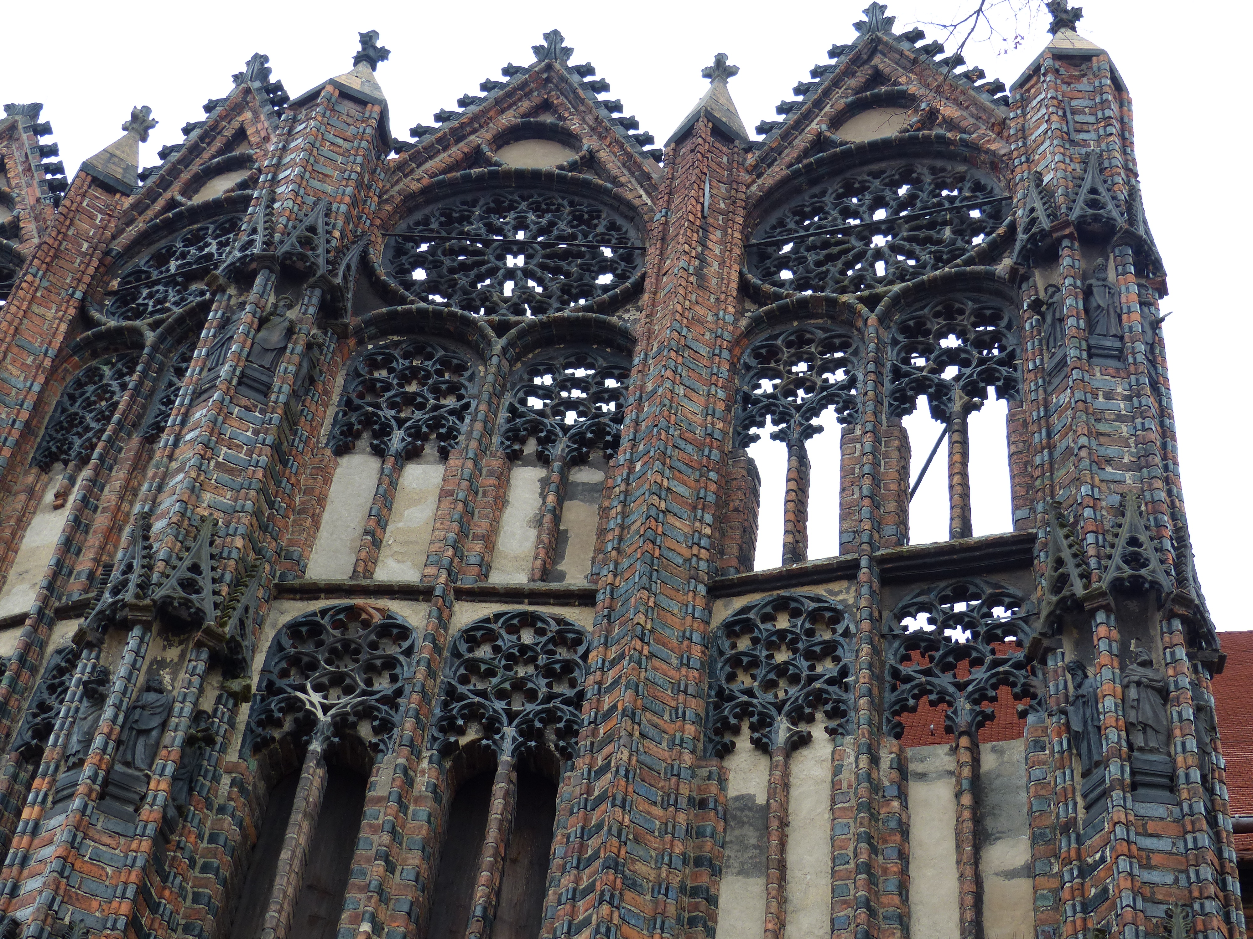 Nordkapelle der Katharinenkirche in Brandenburg (Havel), oberes Maßwerk